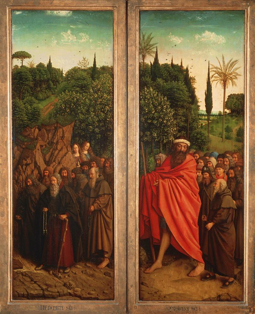 retable de l'Agneau mystique